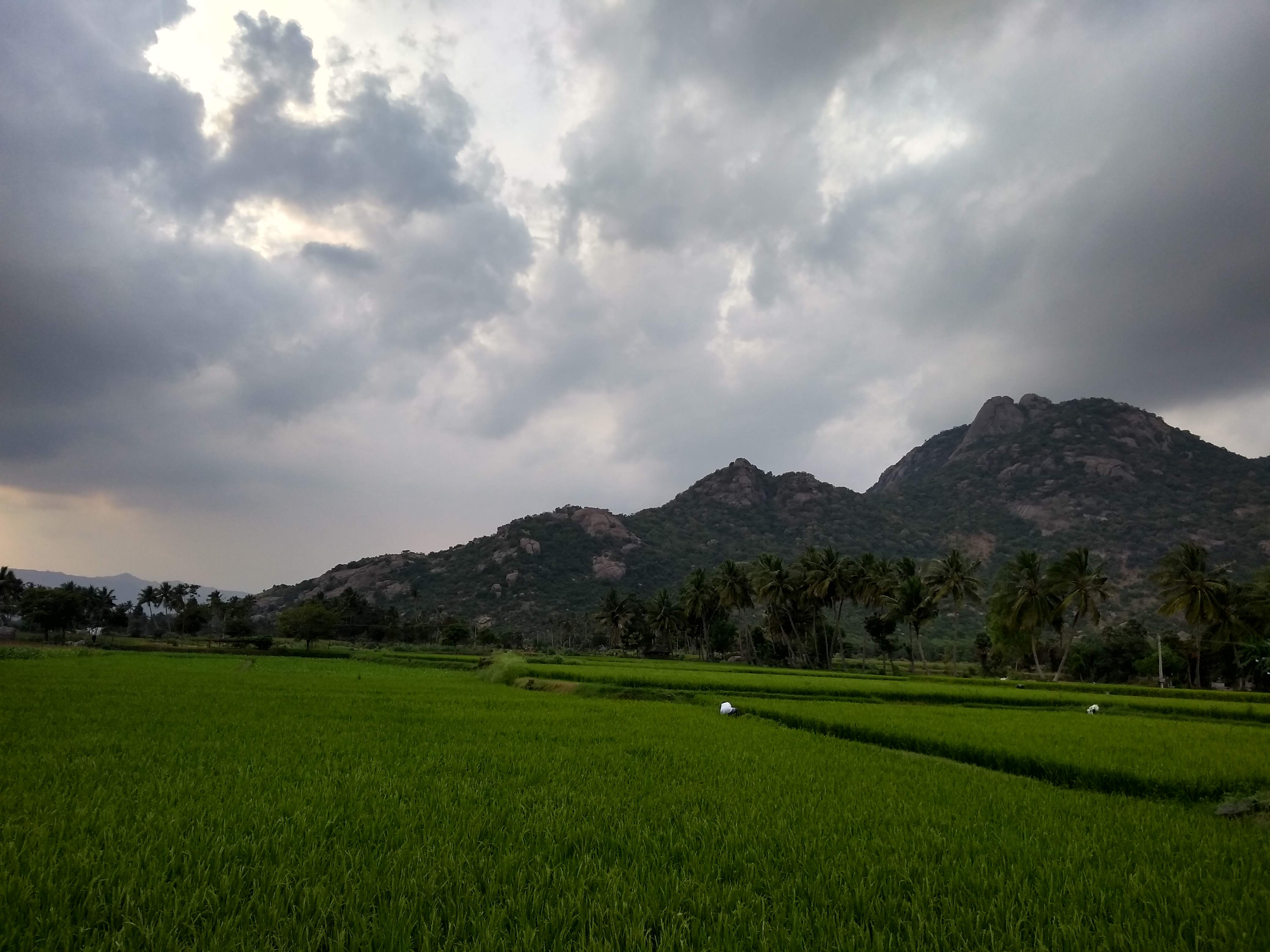 அரசம்பட்டிலிருந்து கல்வராயன் மலையின் தோற்றம்